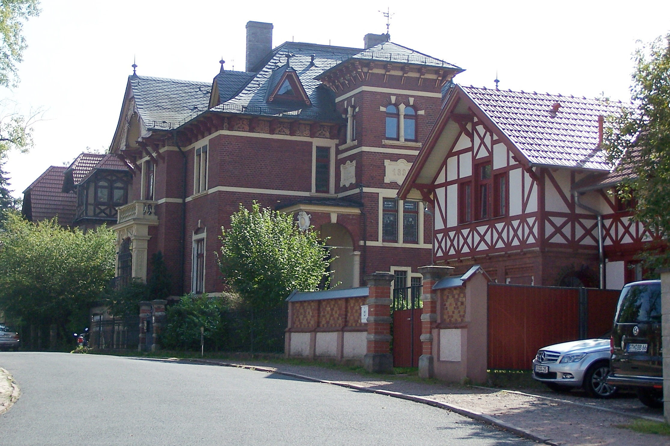 Gesamtansicht der Villa, rechts ein zugehöriges Nebengebäude.